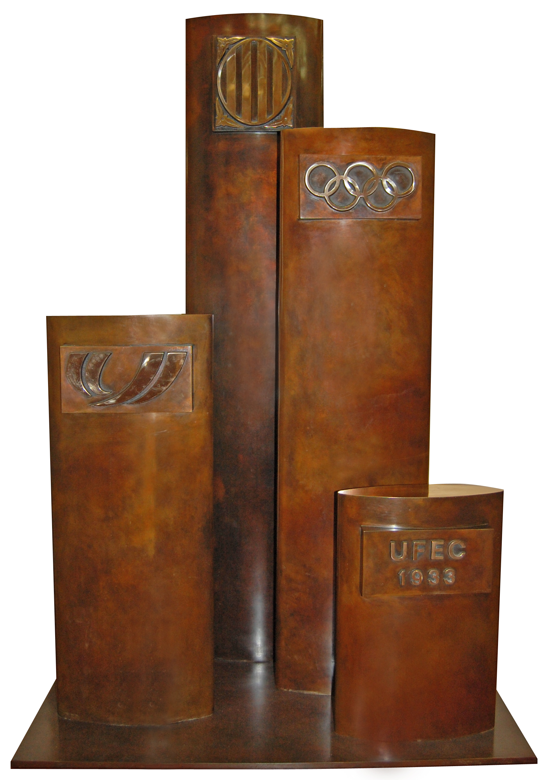 Escultura en bronze de Rosa Serra